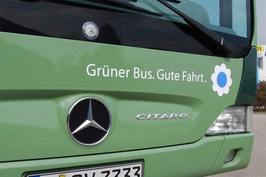 Werbespruch der Gersthofer Verkehrsgesellschaft (GVG) an einem ihrer Linienbusse.